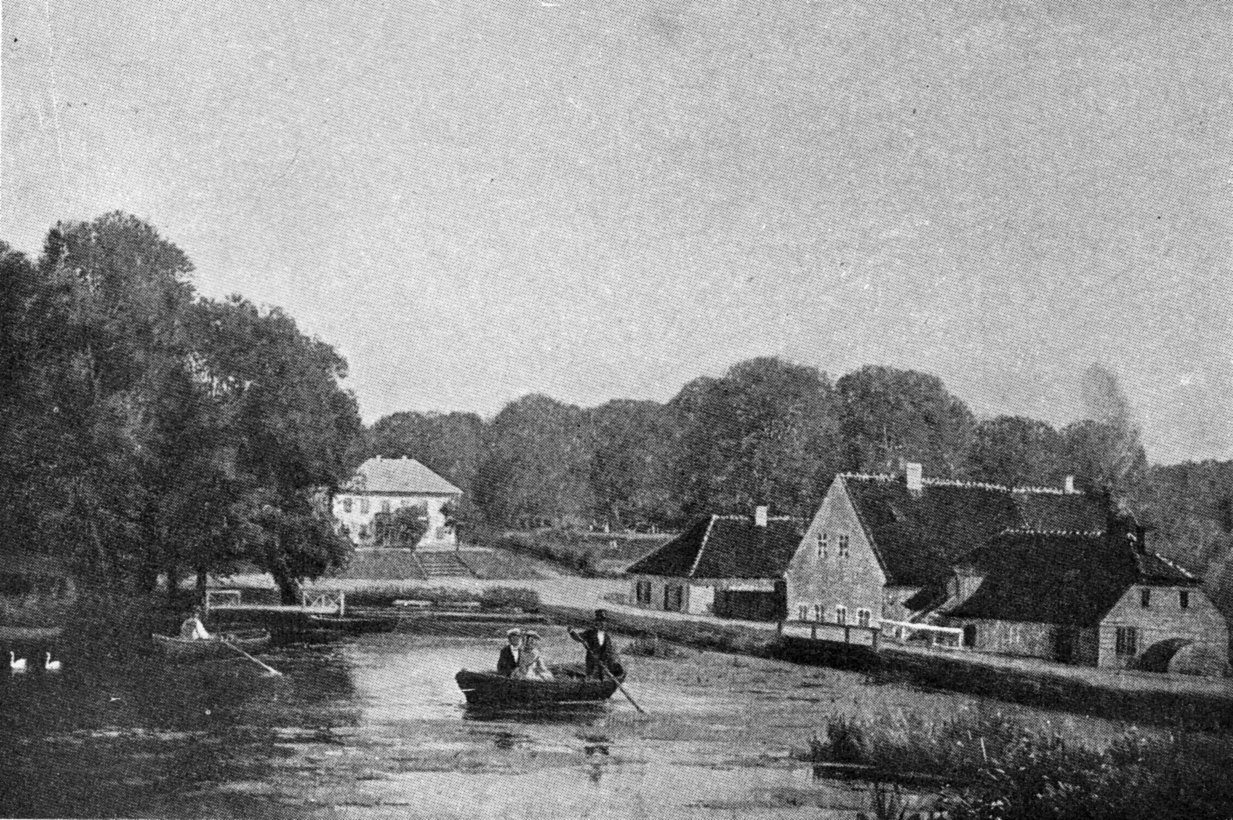 Raadvad eller Rådvad er en lille bebyggelse i Taarbæk Sogn og Lyngby-Taarbæk Kommune ved Mølleåen i midten af Dyrehaven. Den er opstået som en tidlig industriby omkring vandmøllen.